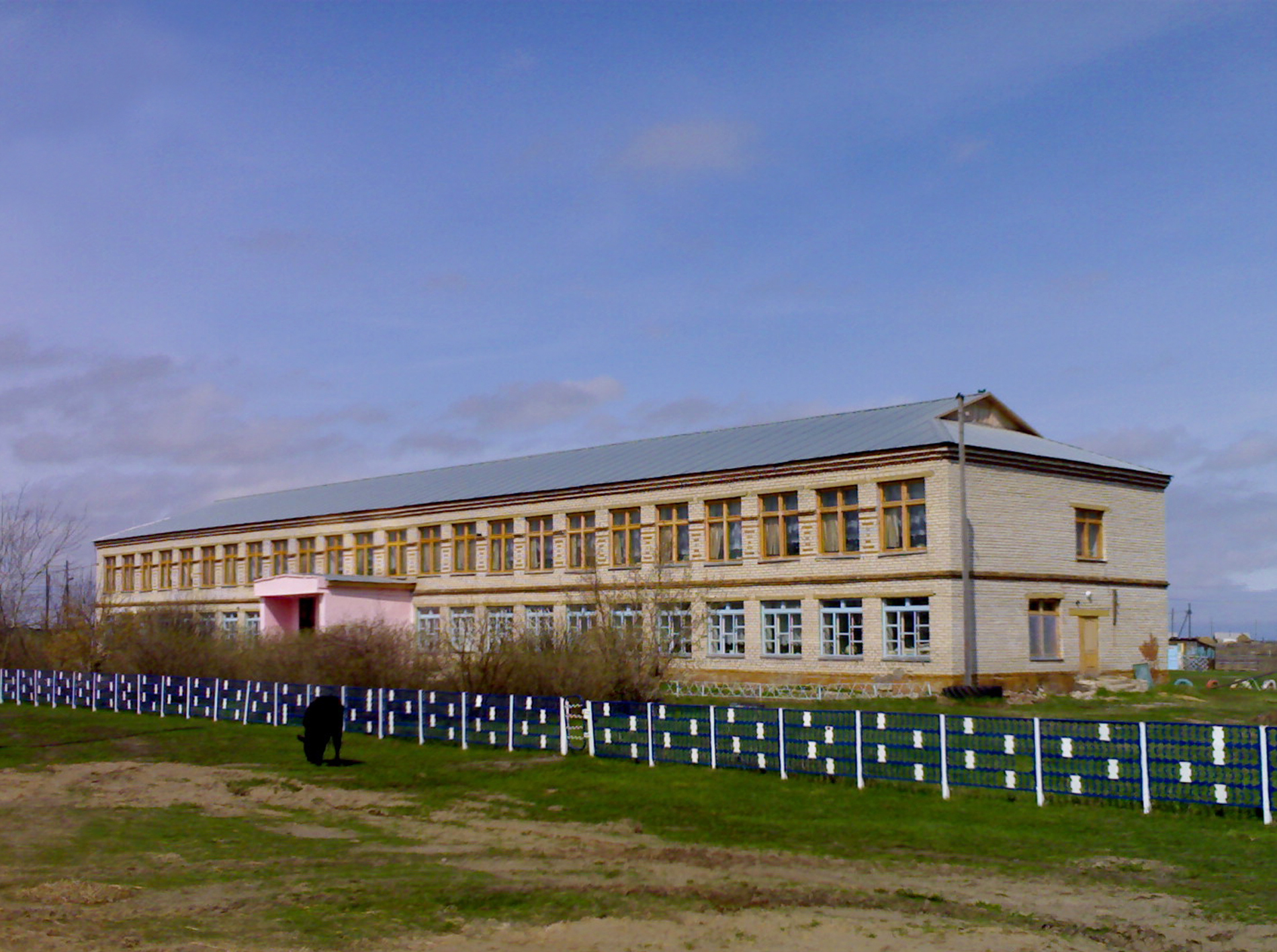 Школа в селе Афонькино Казанского района